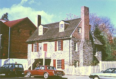 Old Stone House in Washington. Das älteste Gebäude in Washington - es wurde 1764 das erste mal urkundlich erwähnt.